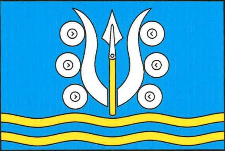 Dlouhá Ves, okres Klatovy, vlajka